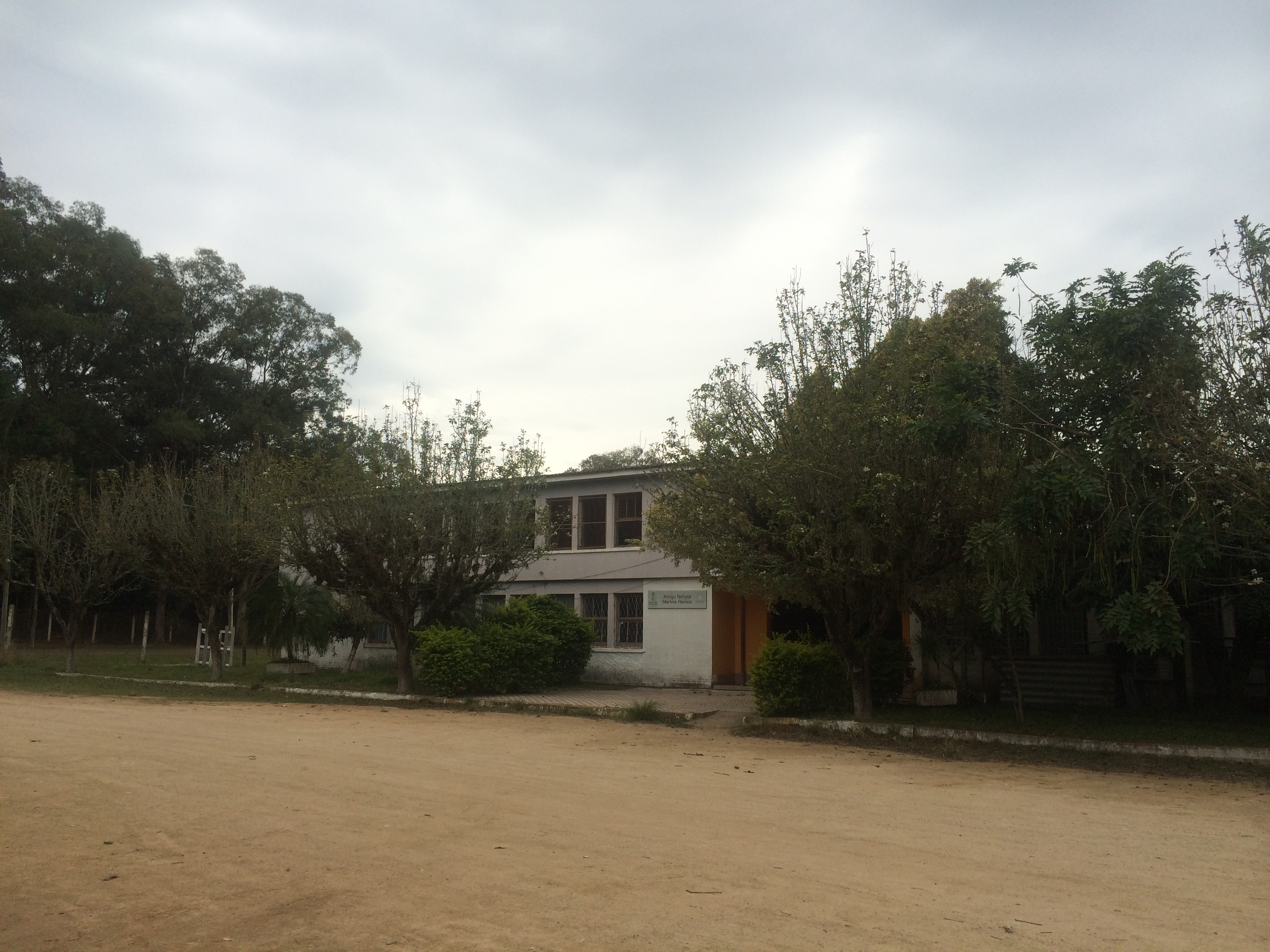 Abrigo Nehyta Martins Ramos, em Belém Novo, Porto Alegre - RS